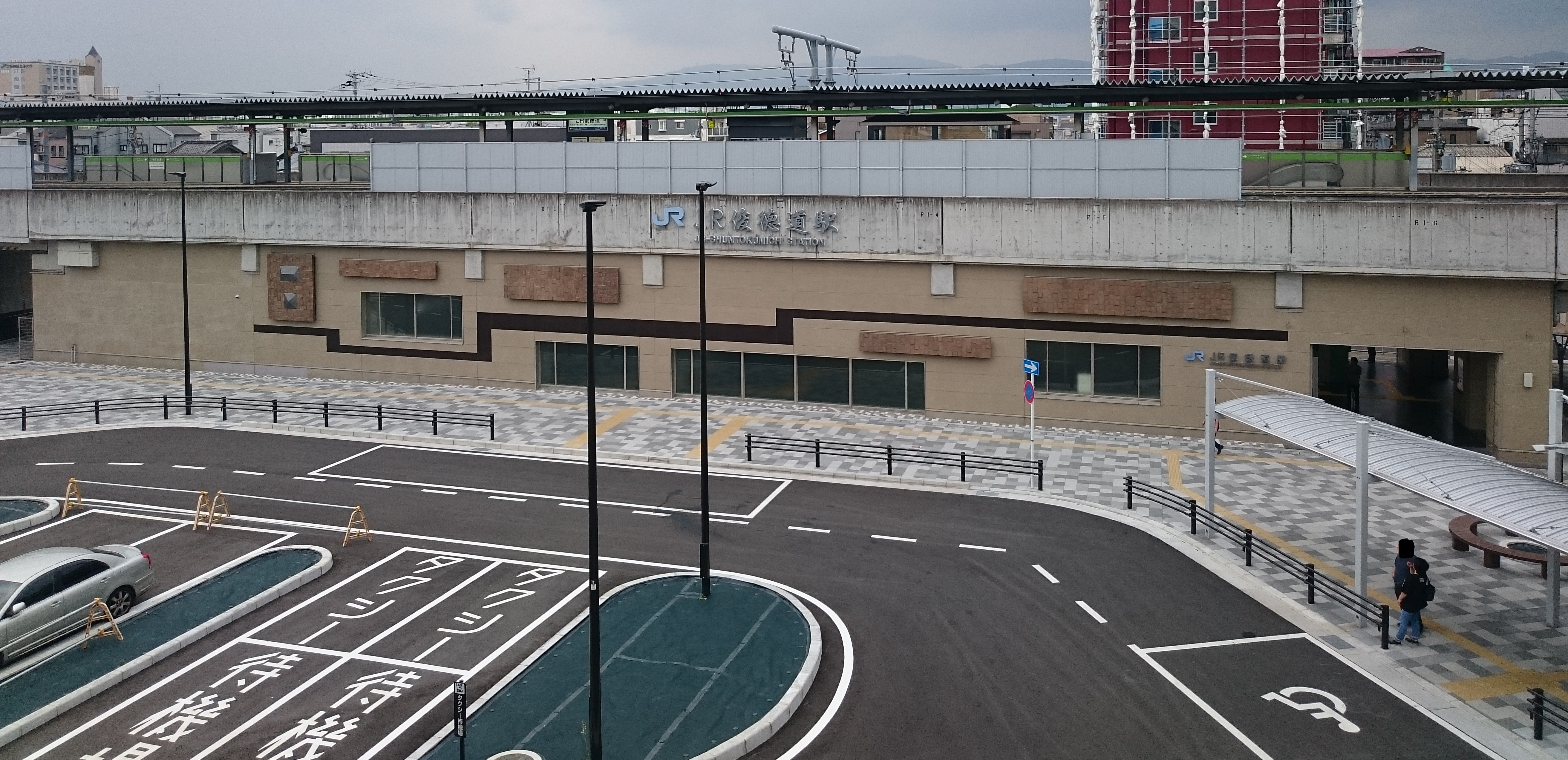 JR俊徳道駅の駅舎外観 Sony Xperia Z3